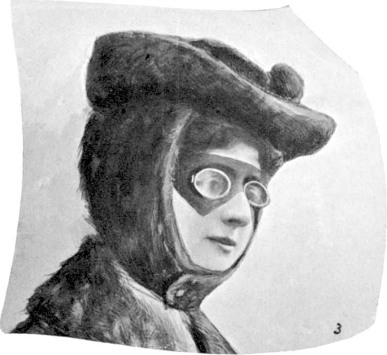 Concoure De Chauffeuses. - Au moment des excursions et des promenades en automobile, il n'est pas rare de croiser sur les routes, sillonnées par d'innombrables voitures, des êtres humains dont la tenue ou les lunettes empêchent qu'on, les reconnaisse. C'est pourquoi nous demandons aujourd'hui à nos lectrices de nous dire quelles sont ces douze chauffeuses, qui sont douze artistes des plus connues du public. (Voir le règlement de ce concours à la page xv.)